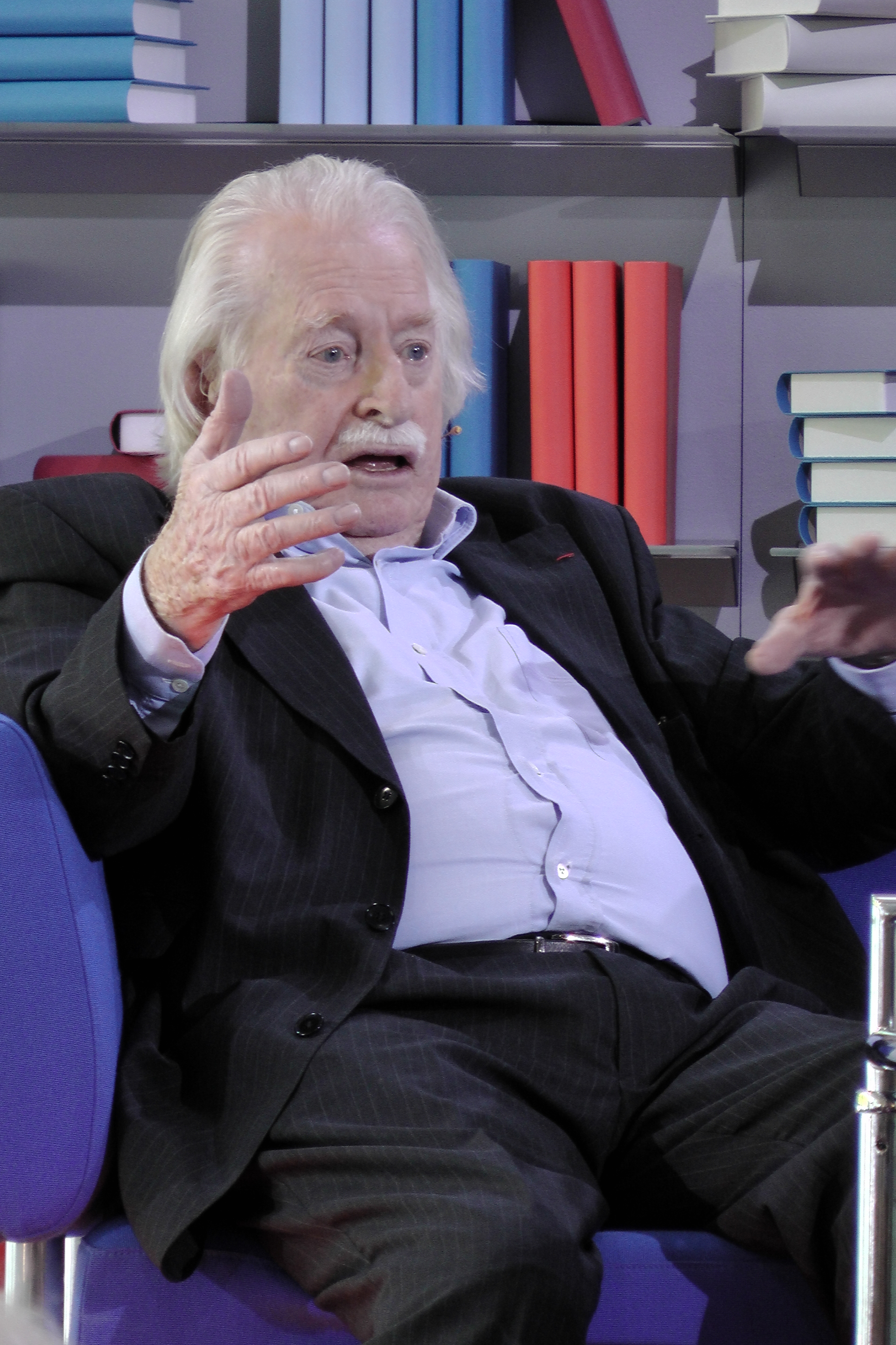 Dieses Fotos dürfen Sie honorarfrei nutzen, wenn Sie folgenden credit beachten: Copyright: Das blaue Sofa / Club Bertelsmann. Klaus Harpprecht, geb. 1927, hat als Journalist unter anderem für RIAS, SFB und ZDF gearbeitet. Von 1966 bis 1969 war er Leiter des S. Fischer Verlags und von 1972 bis 1974 Chef der Schreibstube und Berater von Willy Brandt. Lebt als freier Schriftsteller in Frankreich. Publikationen u.a.: „Georg Forster oder Die Liebe zur Welt“ (1990), „Thomas Mann. Eine Biographie“ (1995), „Im Kanzleramt. Tagebuch der Jahre mit Willy Brandt“ (2000), „Harald Poelchau – Ein Leben im Widerstand“ (2004).; „Die Gräfin Marion Dönhoff“ (2008), „Arletty „ (2011).